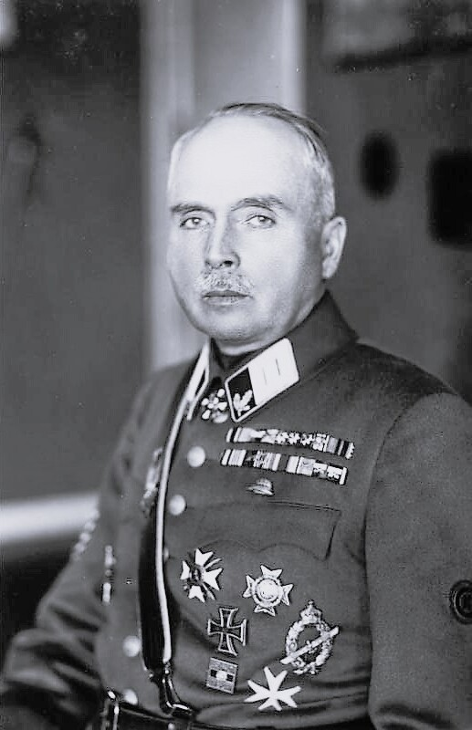 Karl-Eduard von Sachsen-Coburg und Gotha Porträt Karl-Eduard von Sachsen-Coburg und Gotha, in Uniform mit zahlreichen Orden Abgebildete Personen: Sachsen-Coburg und Gotha, Karl-Eduard von: 1884-1954, Herzog, Präsident des Deutschen Roten Kreuzes, Deutschland